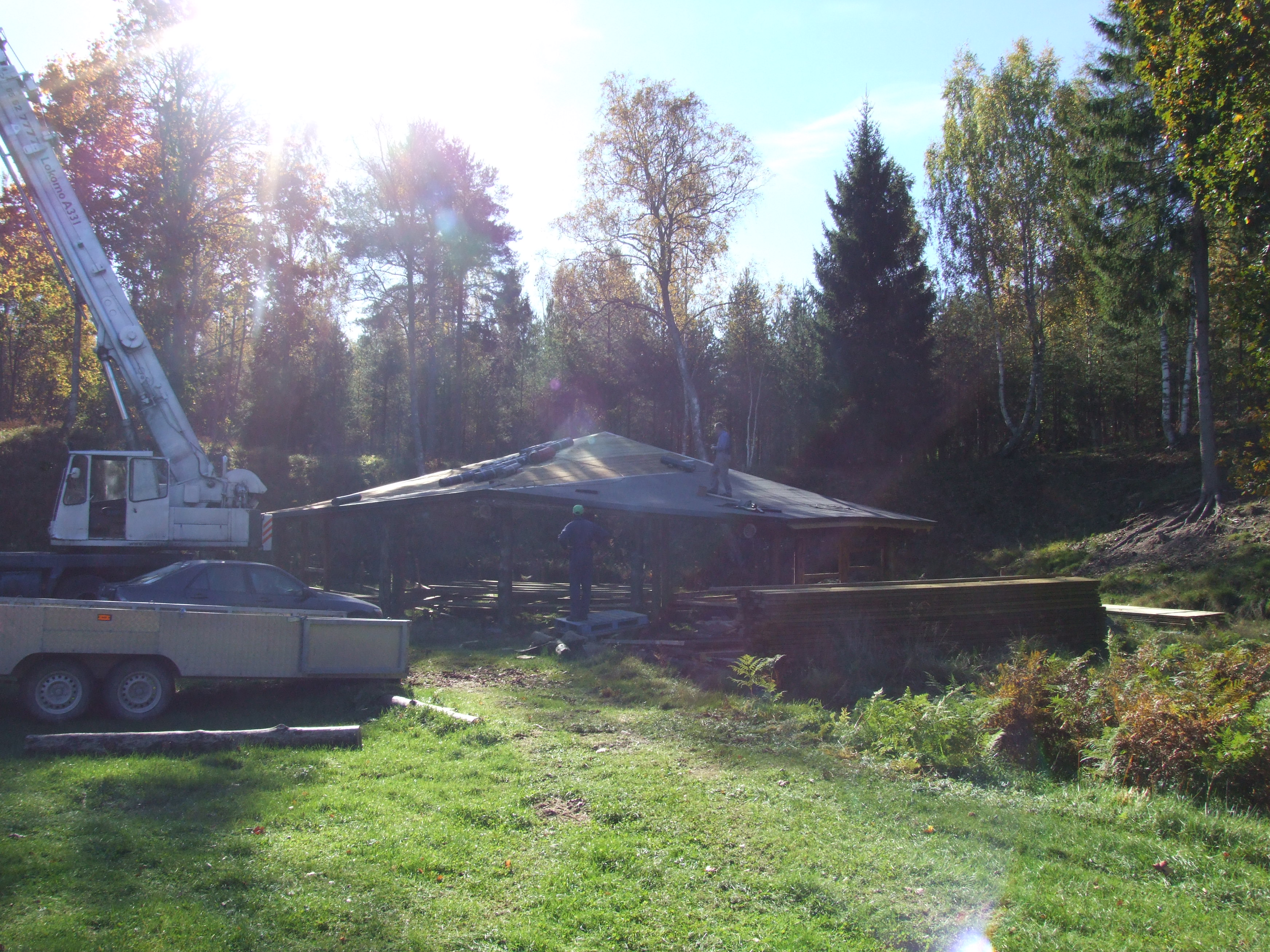 Kalju-lava ehitamine 2011 aasta sügisel